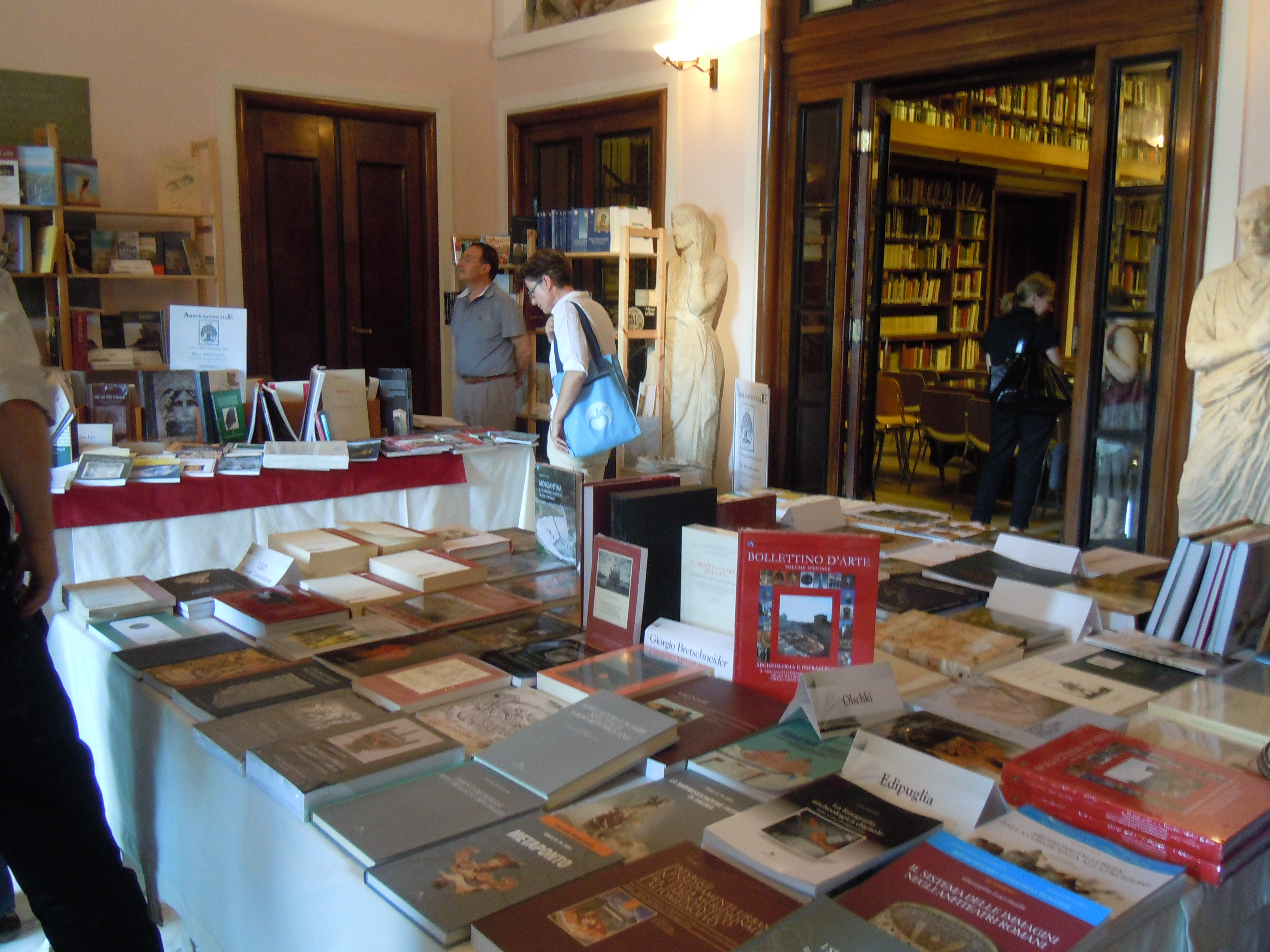 Biblioarché al Koninklijk Nederlands Instituut Rome - Ediarché 2012